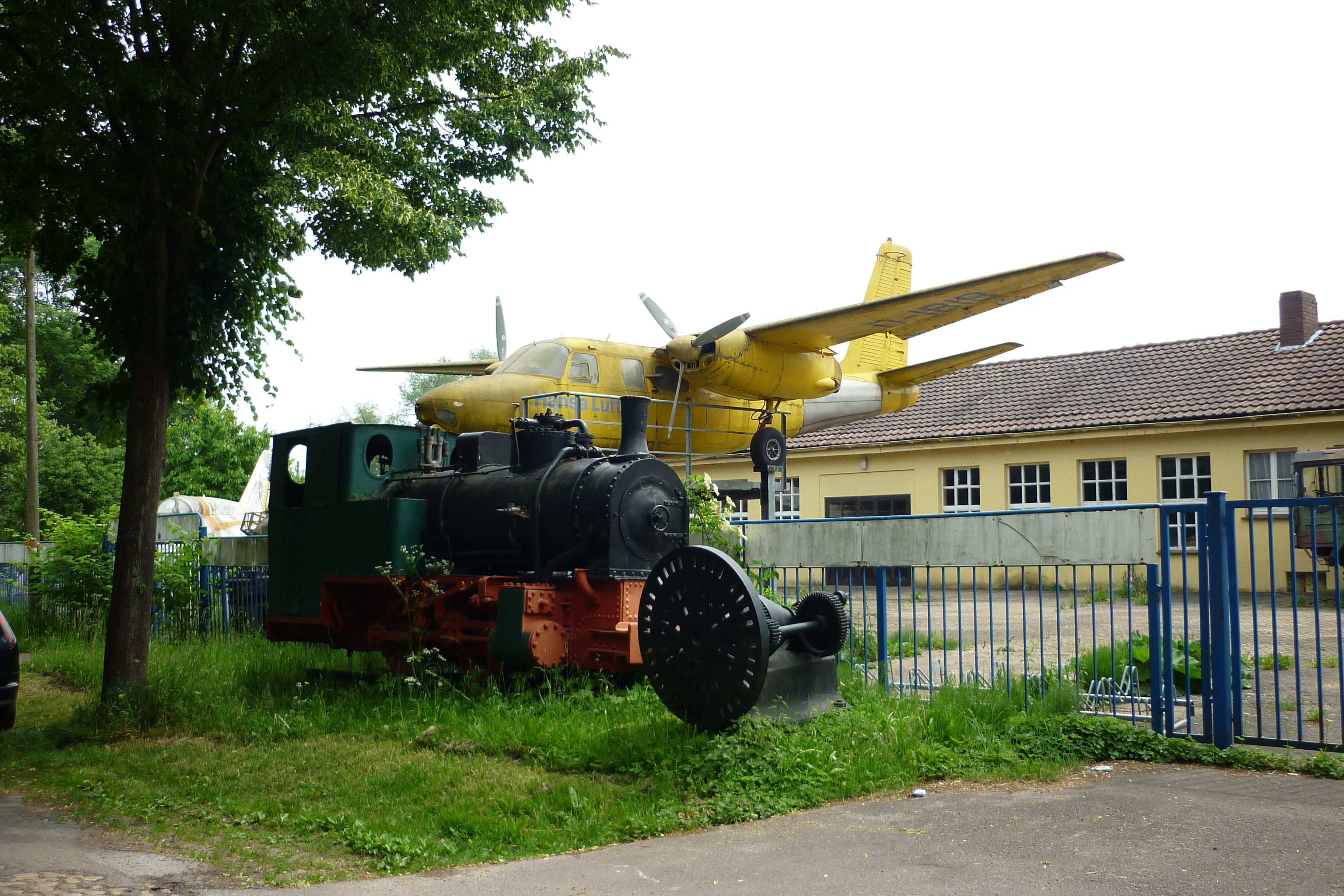 Bad Oeynhausen. Das ehamalige "Motor Technica Museum" im Stadtteil Rehme. Blick auf Halle und Aussenbereich. Museum ist seit 2007 geschlossen.